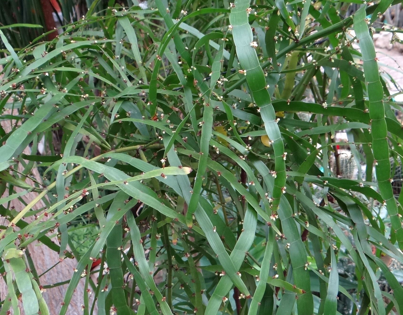 Homalocladium platycladum. Location: Poland, Botanical Garden, Łódź